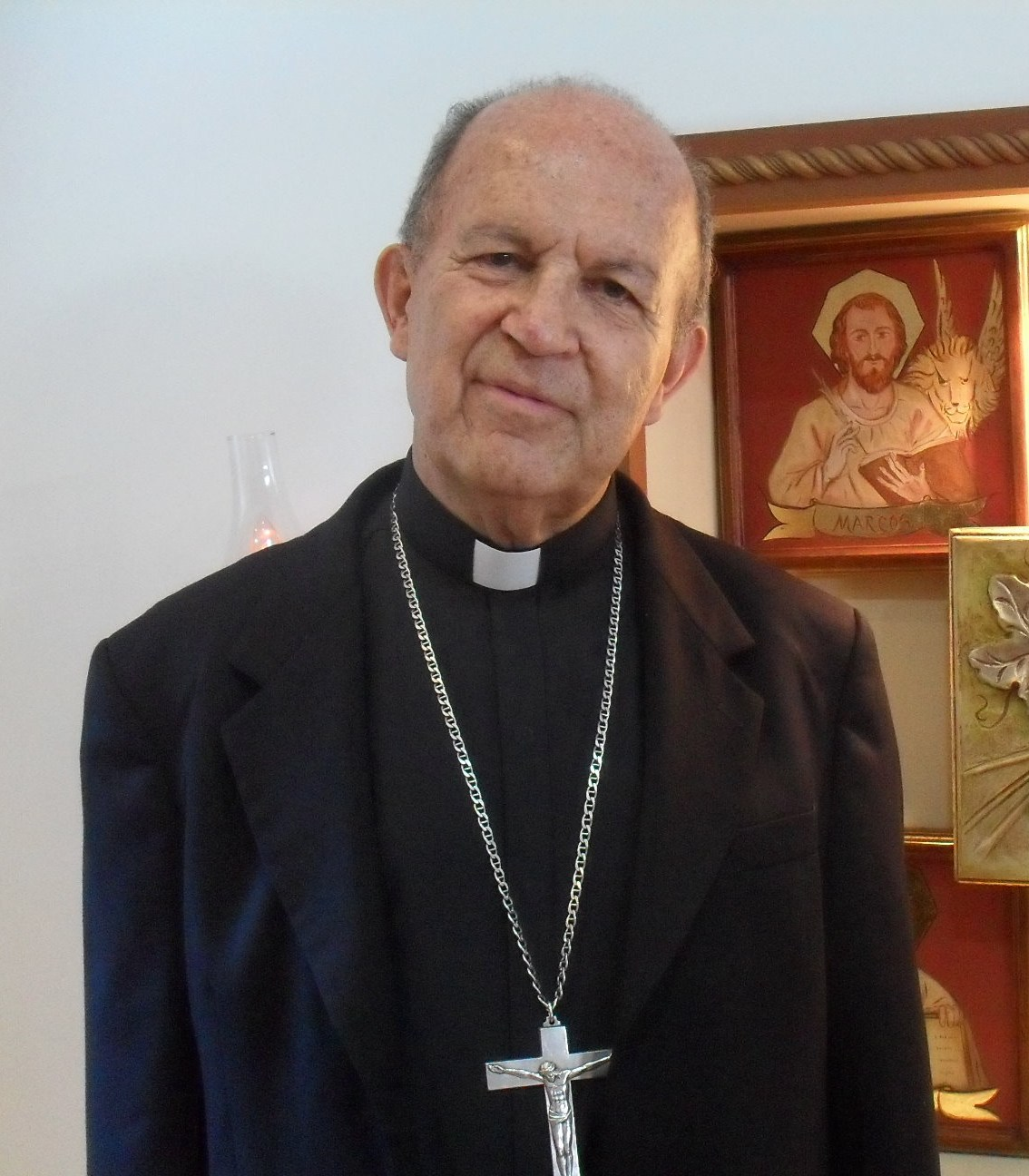 Monseñor Alberto Giraldo Jaramillo, Arzobispo de Medellín